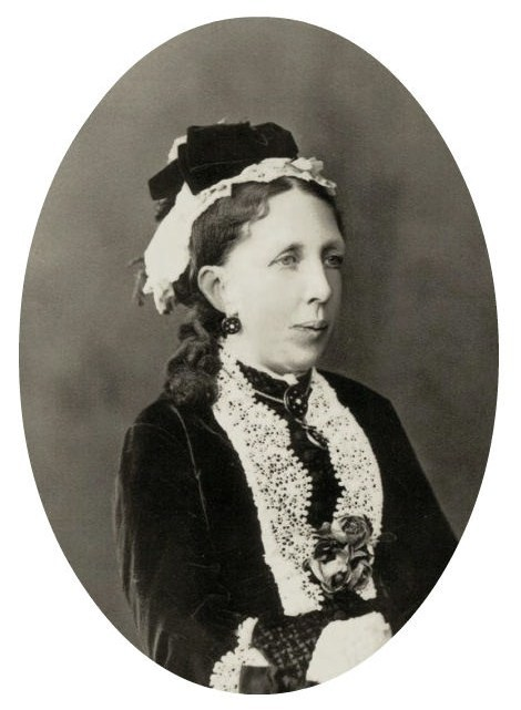 Графиня Викторина Леонтьевна Тотлебен, ур. баронесса фон Гауфф (1833—1907)